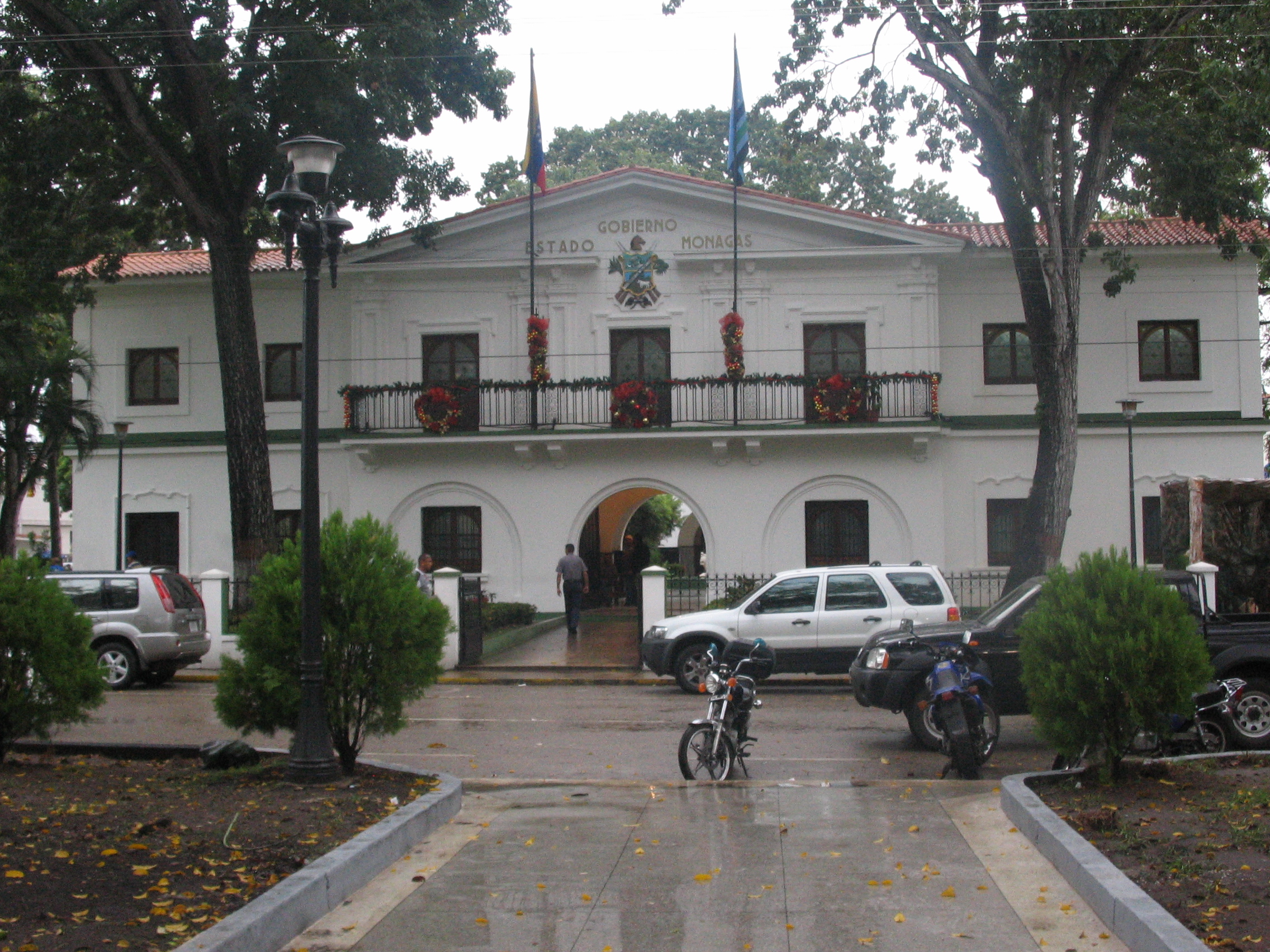 Gobernación del Estado Monagas en Maturín.